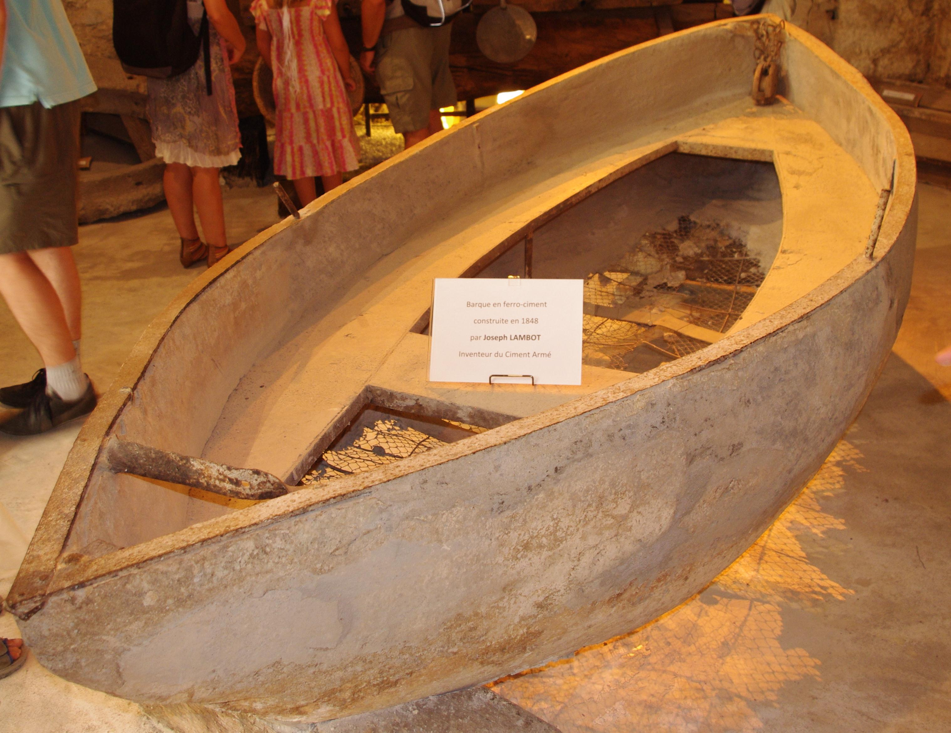 brignoles bateau en ciment armé inventé par Lambot